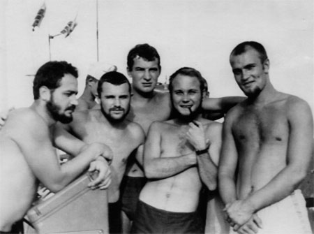 Командир группы ОСНАЗ Карев В.А. и сослуживцы на борту МРЗК Курсограф (1973). Фотоархив Карева Владимира Анисимовича (см. Неизвестные страницы из летописи Тихоокеанского флота).